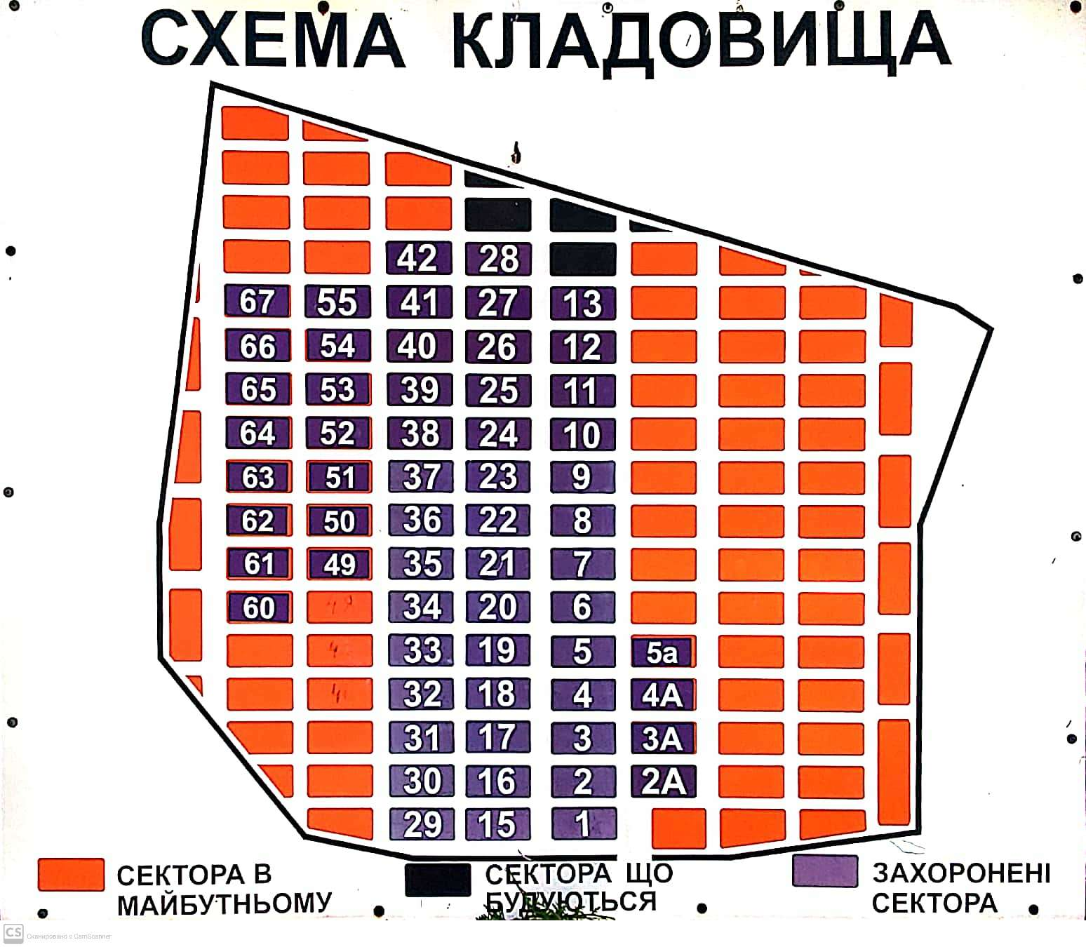 Схема нового кладовища